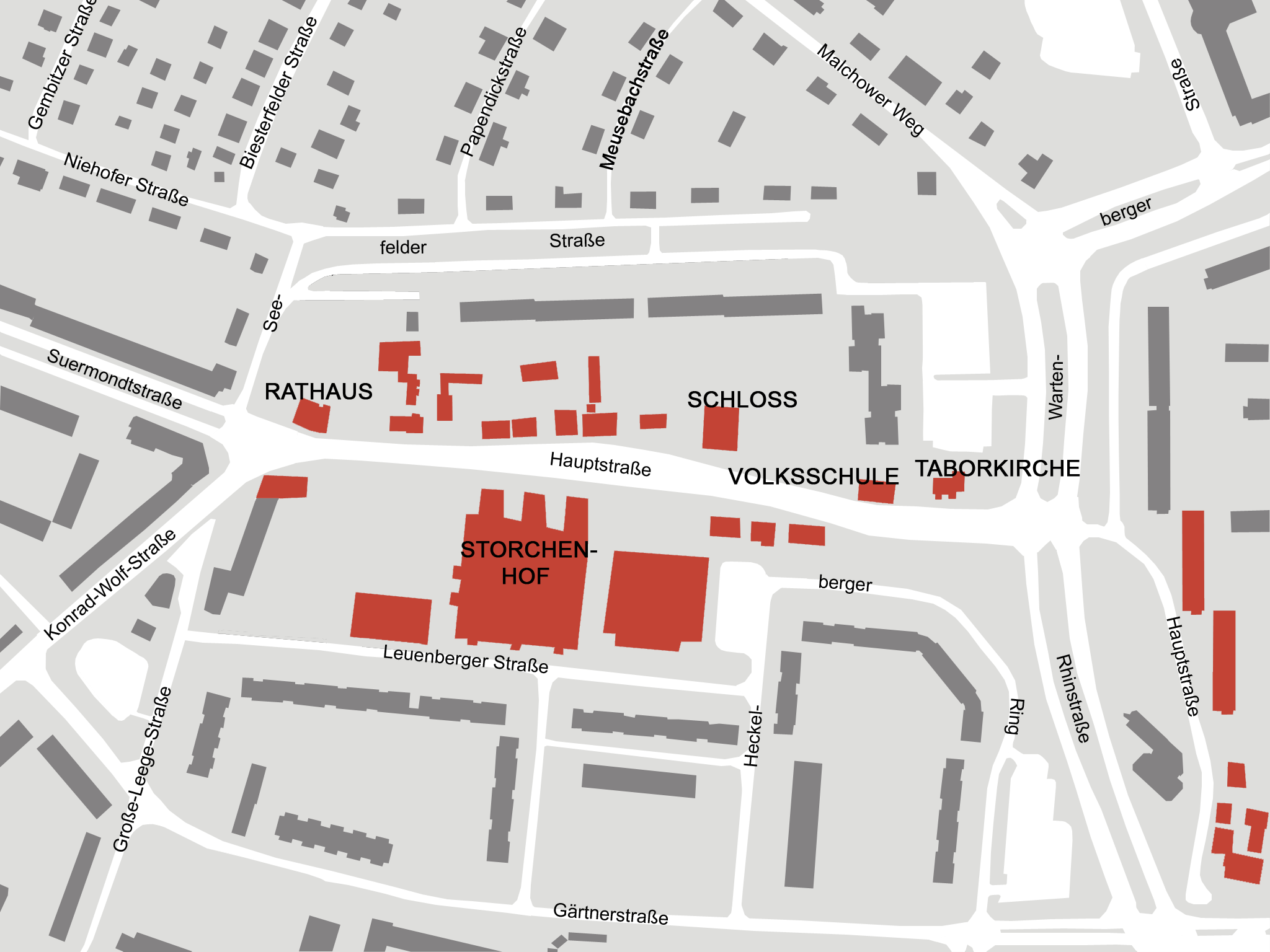 Lage der Hauptstraße in Hohenschönhausen